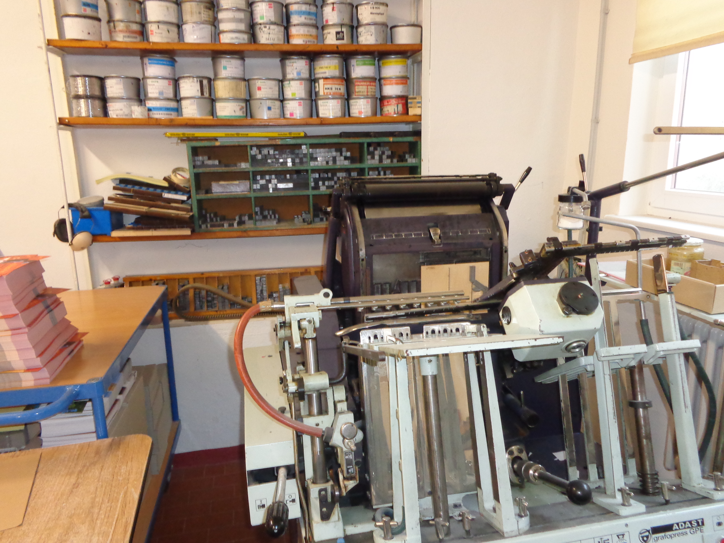 Geöffneter Heidelberger Tiegel, tschechischer Nachbau (ADAST) aus den 1960er Jahren, Druckerei Froh, Plau am See